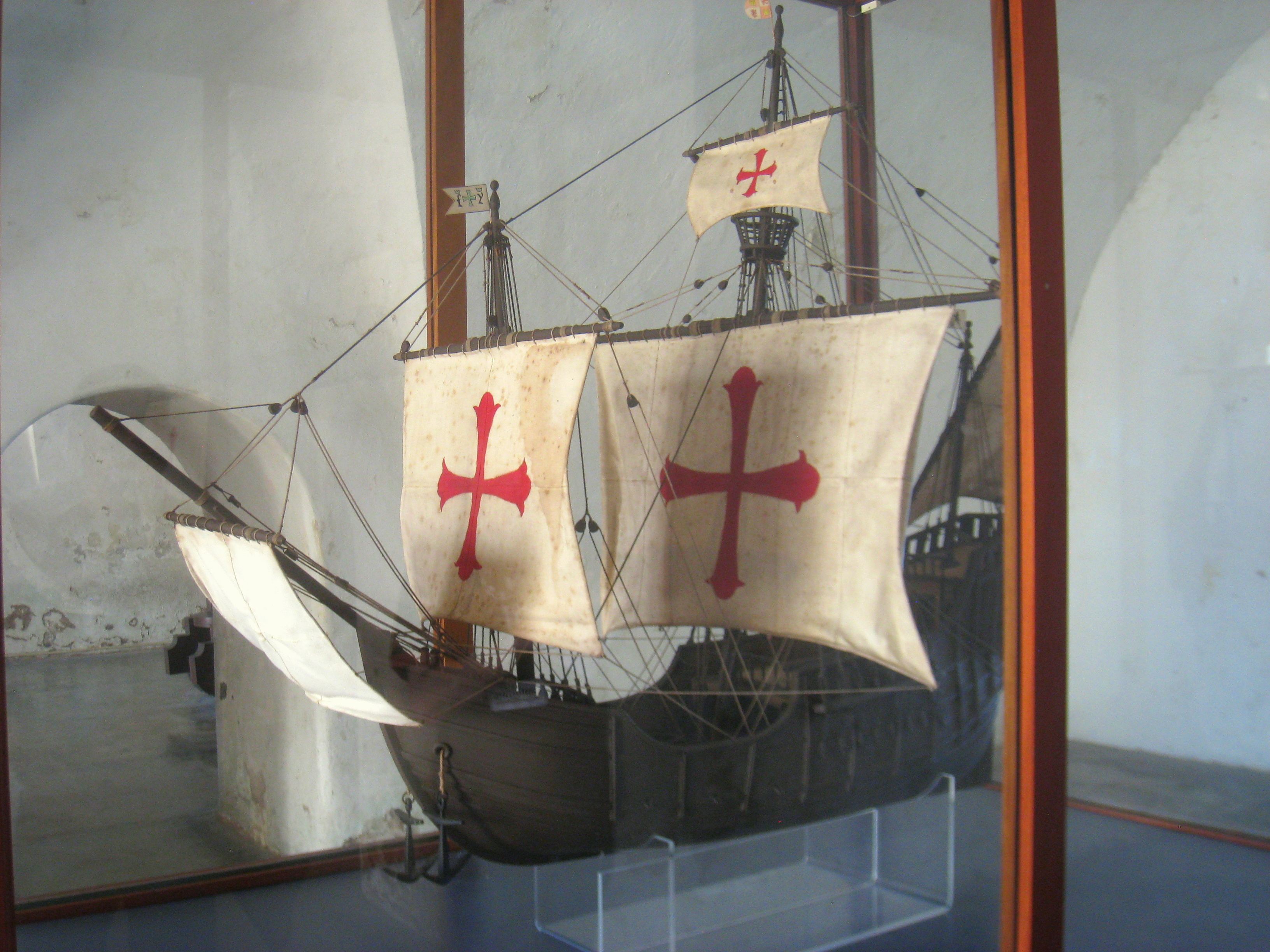 Santa María ship model displayed in Fort San Cristóbal, San Juan, Puerto Rico.